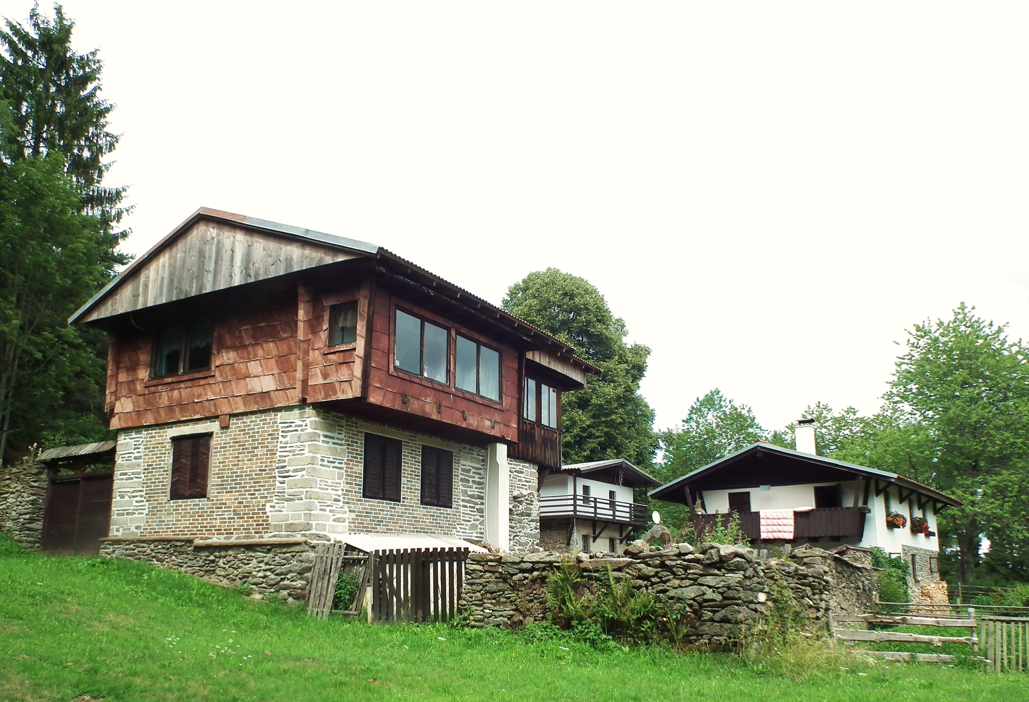 Alpská vyhlídka - polana widokowa na Szumawie, nad Lipnem nad Wełtawą.